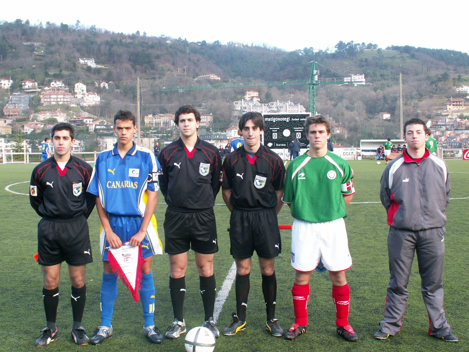 partido de las Selecciónes sub 16 de Euskadi y Canarias en Donosti